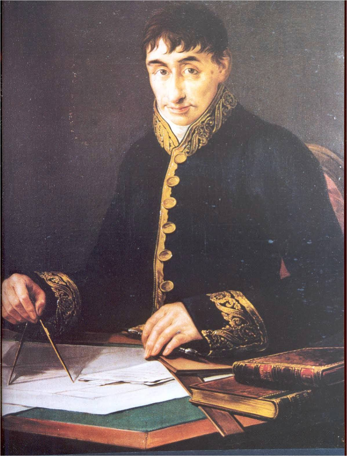 Retrato del arquitecto español Vicente Marzo (1763-1826), que estudió en la Real Academia de Bellas Artes de San Carlos de Valencia y donde recibió el título de Honorario de Arquitectura en 1788. En 1801 sustituyó en la Dirección de los estudios de Arquitectura de dicha academia a Vicente Gascó, y desde 1805 ocupó el cargo de Director General de la Academia de San Carlos, hasta 1814, año en el que fue nombrado académico de Honor. El retratado viste uniforme de académico de la Academia de San Carlos y aparece retratado con una edad de unos cincuenta años, ya que el lienzo fue probablemebte ejecutado hacia 1820.